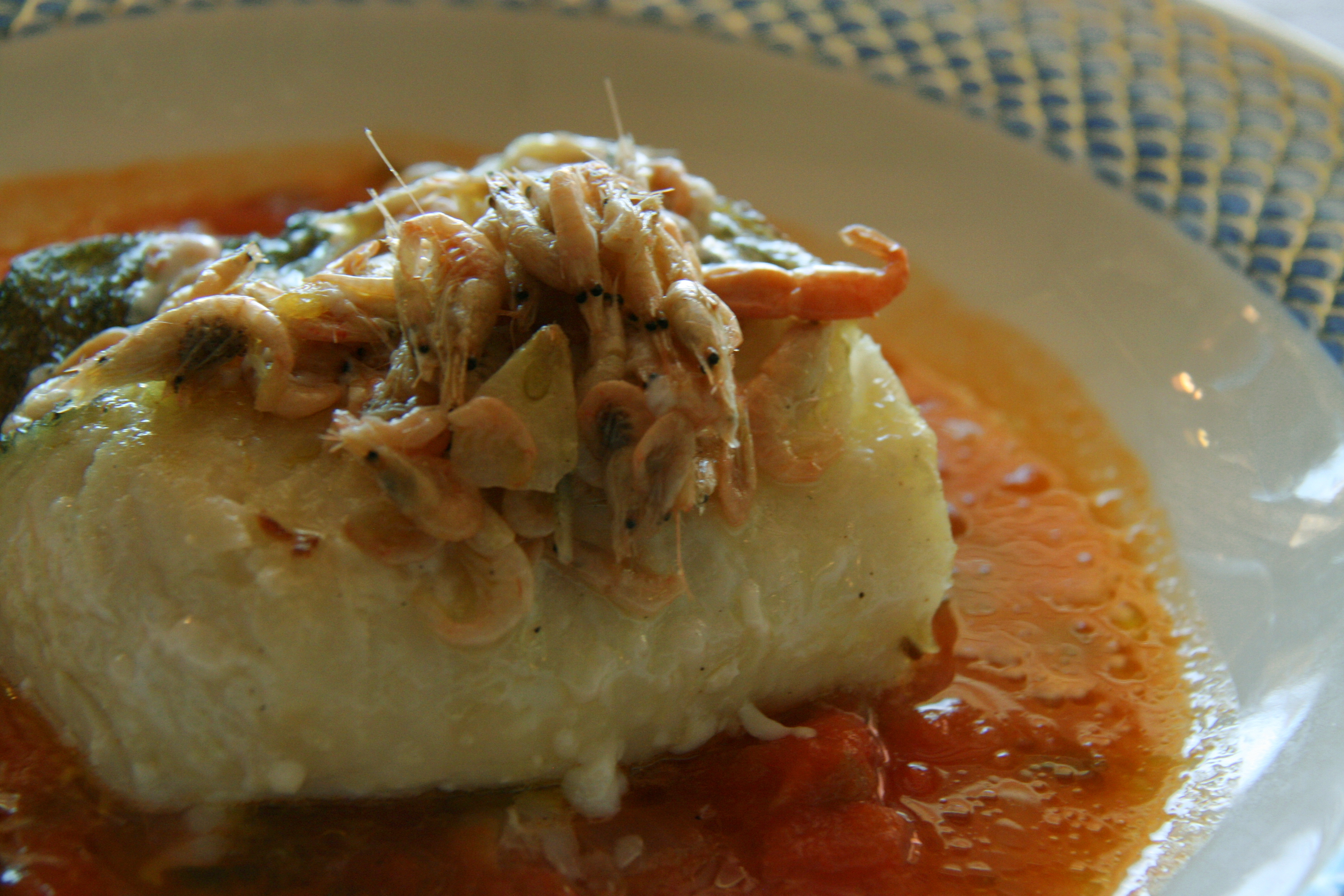 Bacalao al horno con camarones